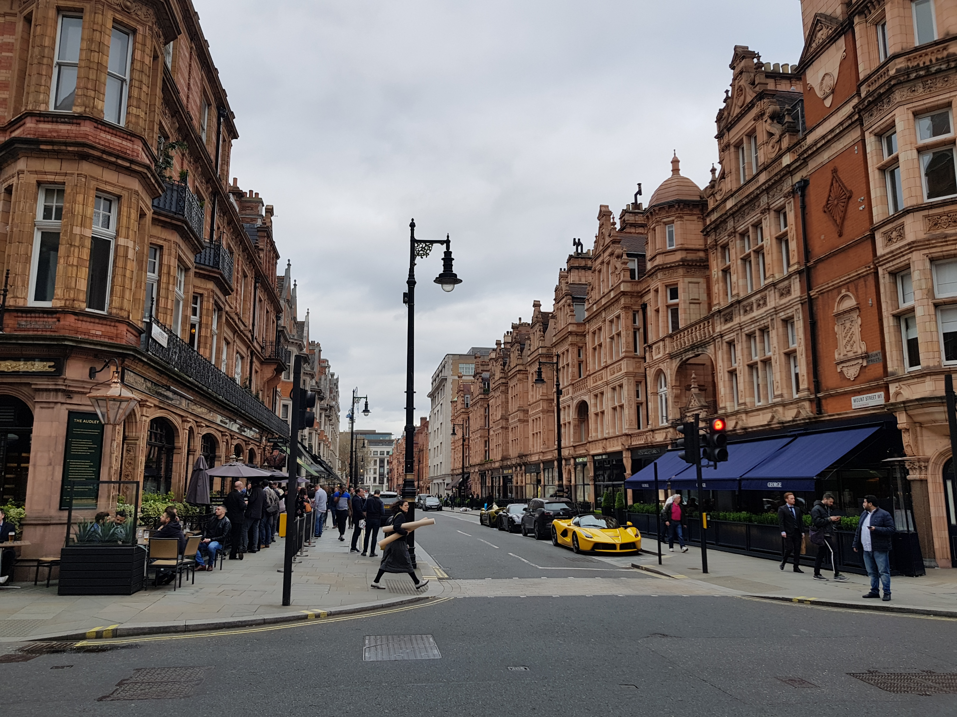 Mount Street, Londres, côté est.